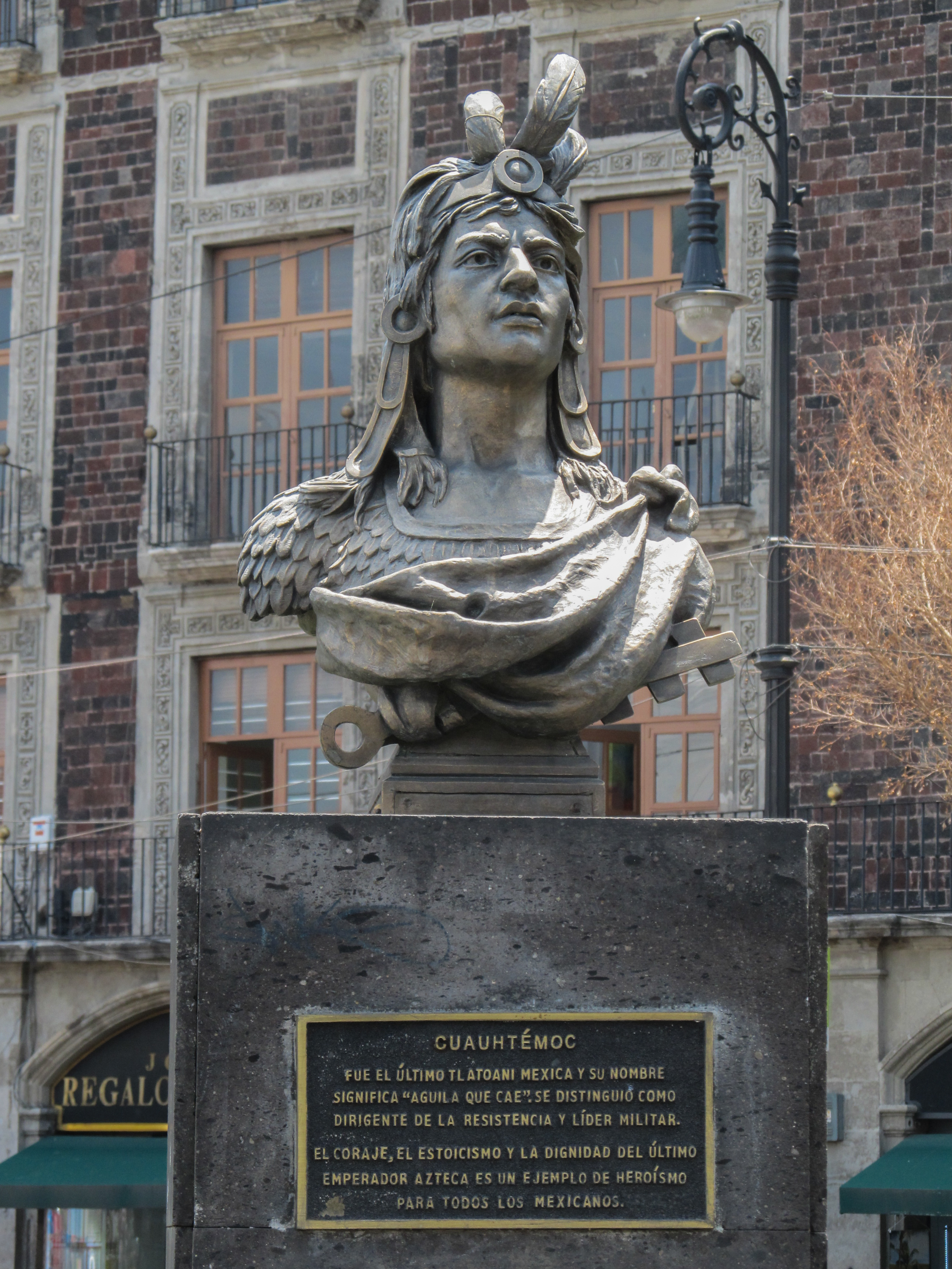 Busto de Cuauhtémoc en el Zócalo, Ciudad de Mexico.